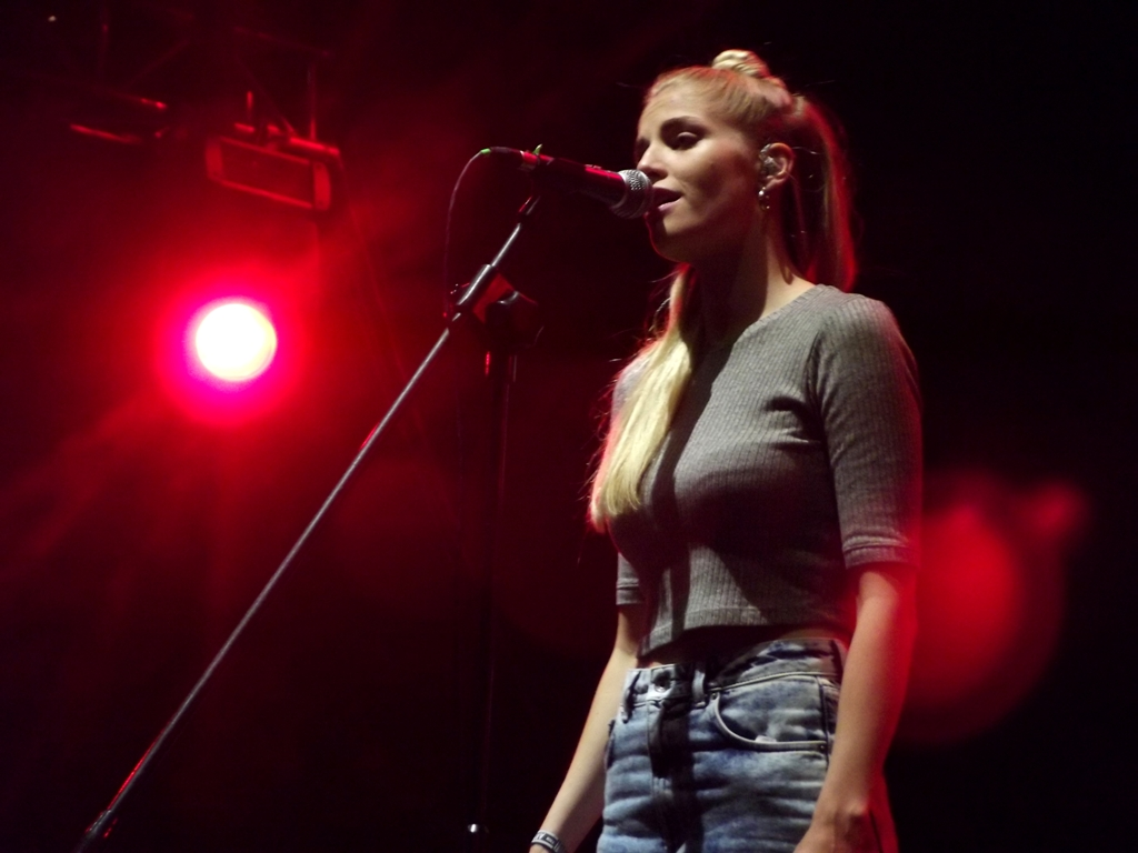 Zdjęcie zrobione podczas 8. edycji festiwalu Tauron Nowa Muzyka, w katowickiej Dolinie Trzech Stawów.